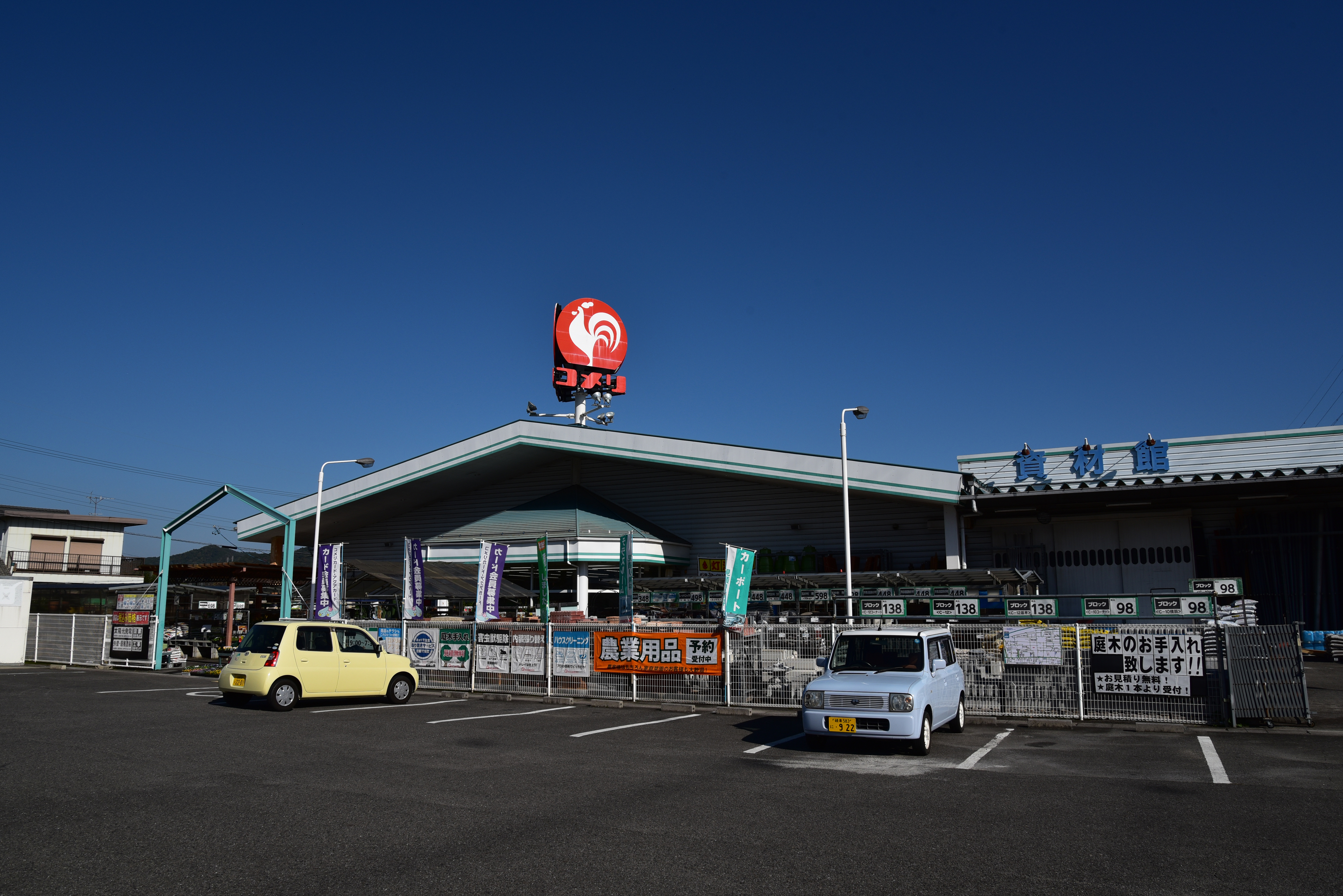 コメリハード＆グリーン池田店の全景です。